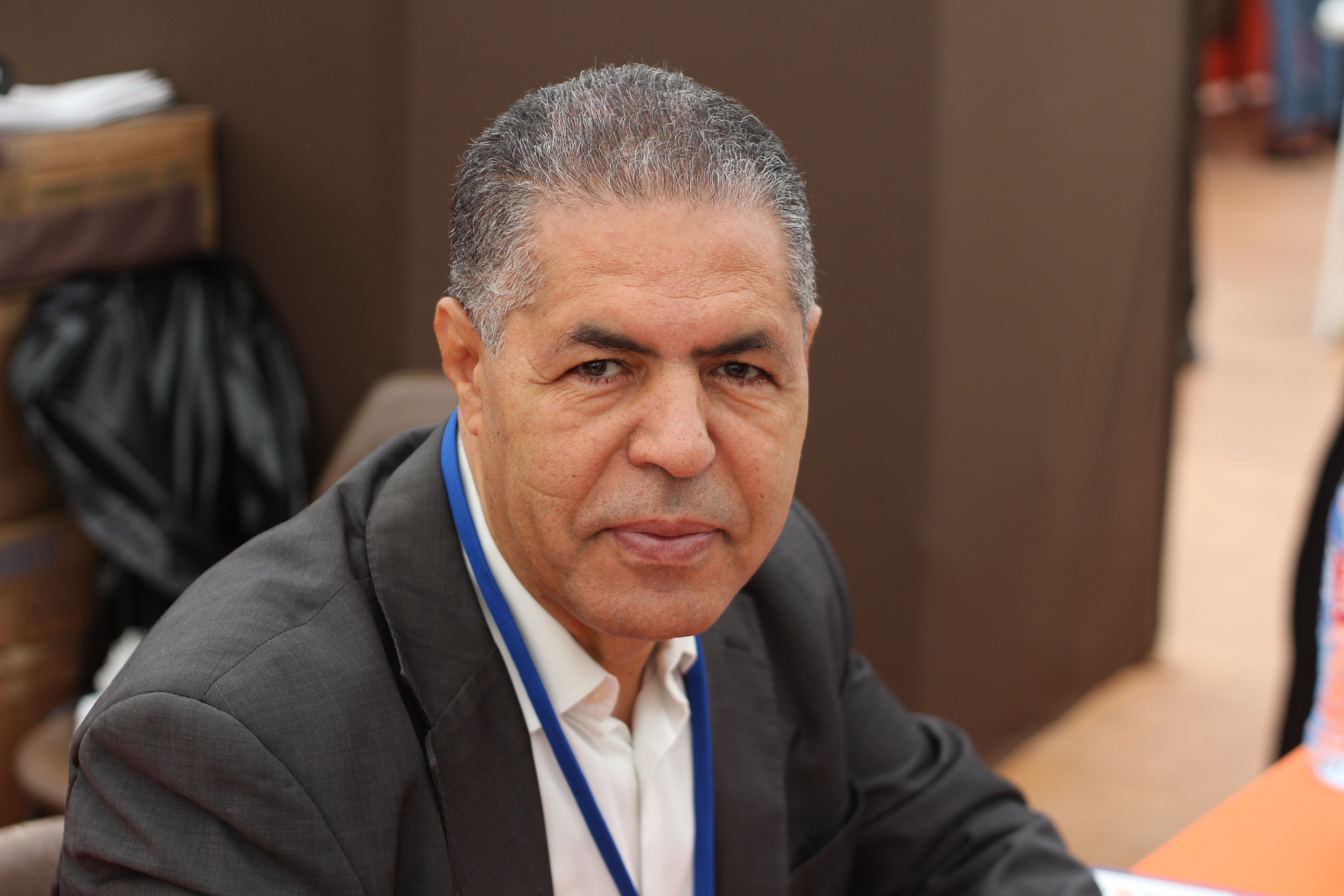 Malek Chebel - Livre sur la Place 2014